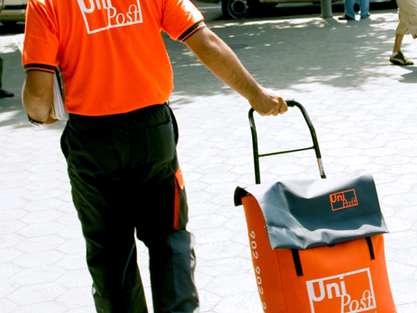 Cartero Unipost